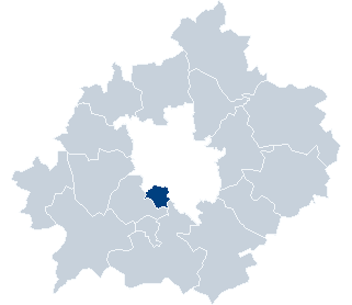 Lokalizacja Lubonia.